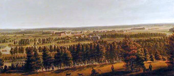 Вид Гатчинского парка Вид на Гатчинскую Мызу и деревни с Сигнальной башни Гатчинского Дворца (картина хранится в Большом Гатчинском Дворце)